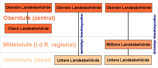 Verwaltungsaufbau der Landesbehörden in Deutschland Autor: C.Löser Erstellt mit: de: Draw